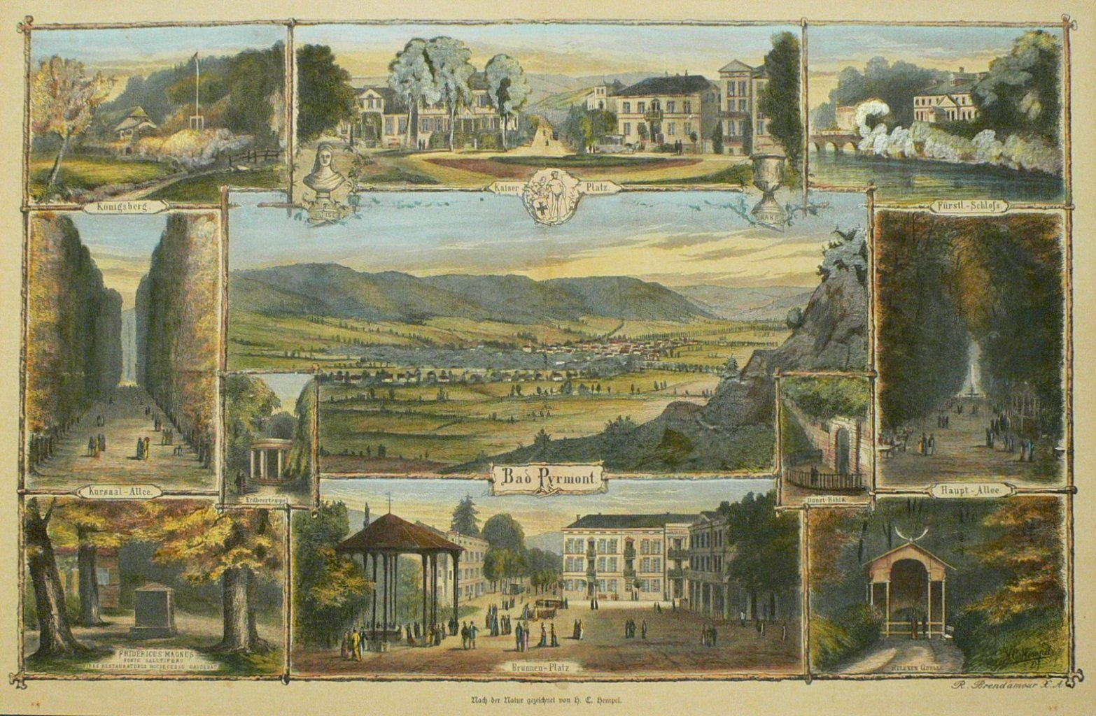 Souvenirblatt von Bad Pyrmont, Holzstich, Richard Brendamour, nach Hermann Carl Hempel, 31,6 × 51,0 cm (Darstellung), 35 × 55 cm (Blatt); Ansichten: Königsberg; Kaiserplatz; Fürstliches Schloss; Kursaal-Allee; Erdbeertempel; Bad Pyrmont; Dunst-Höhle; Haupt-Allee; Denkmal für Friedricus Magnus; Brunnen-Platz; Helenen Quelle